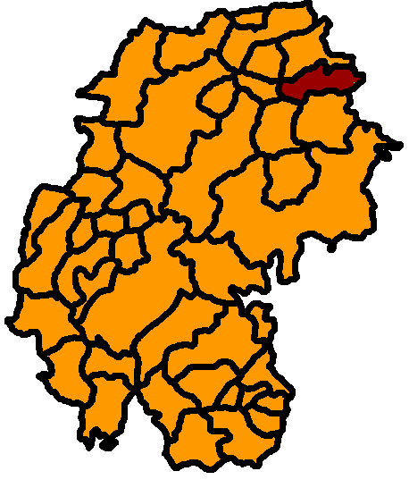 Osthausen-Wülfershausen hervorgehoben, Ilm-Kreis